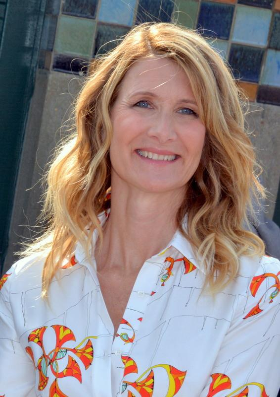 Laura Dern au festival du cinéma américain de Deauville